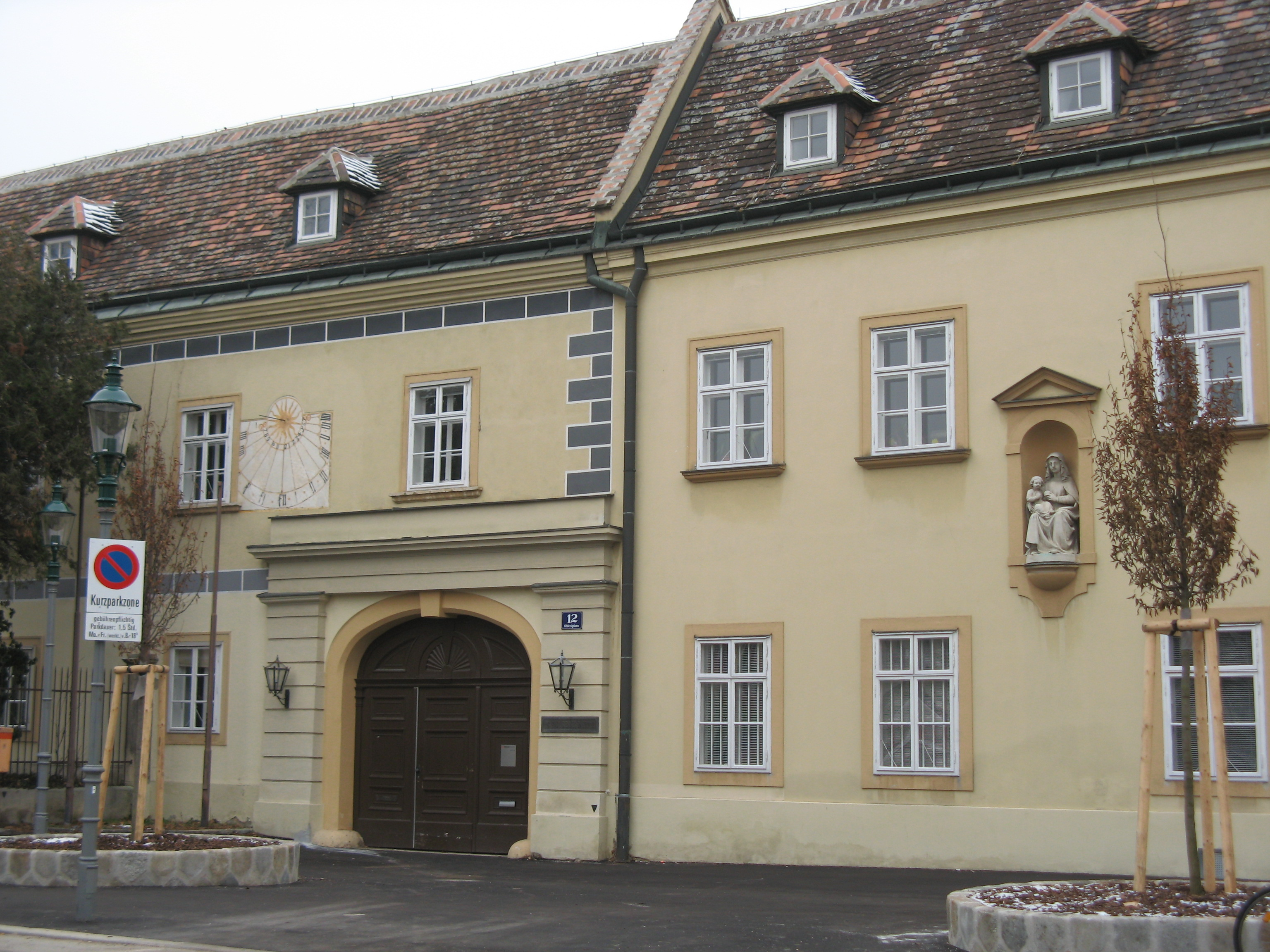 Schloss Altmannsdorf (um 1820) in Wien-Meidling